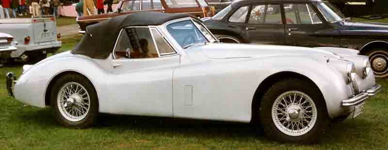 Jaguar XK120